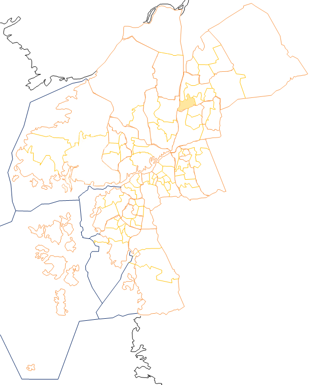 Karta som visar primärområdes belägenhet i Göteborg